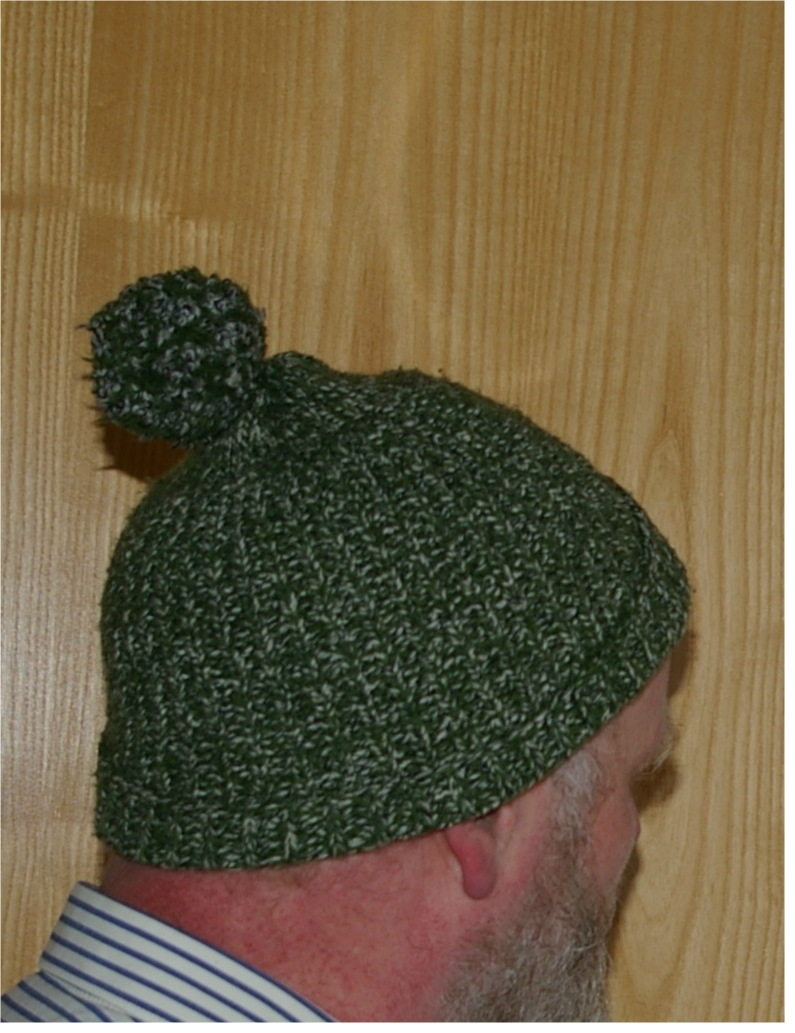 eigene Bommelmuetze, von der Mama verfertigt ca. 1980